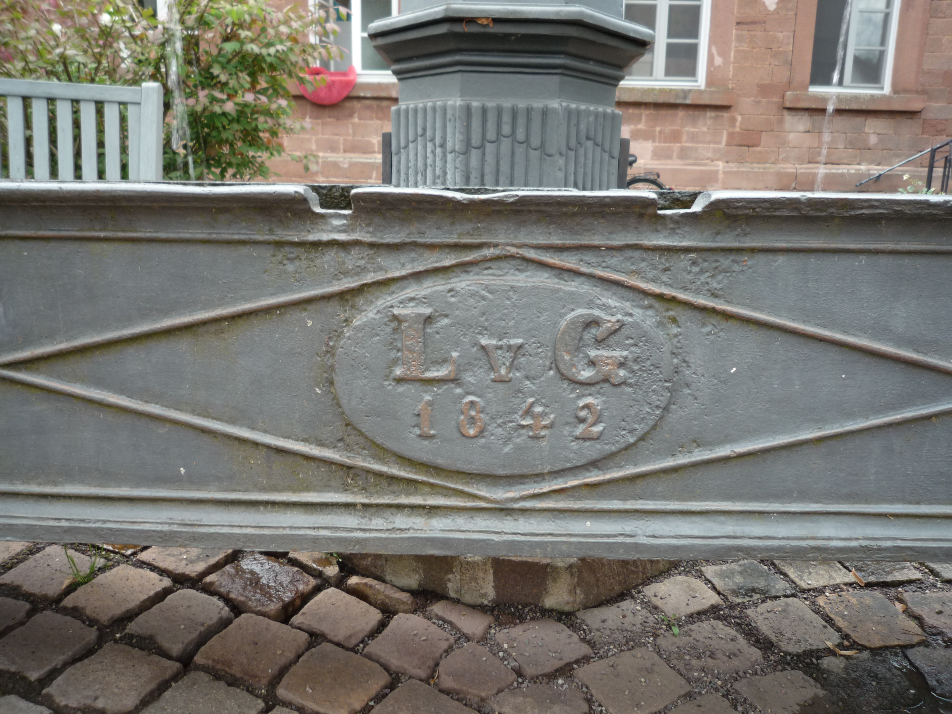 Gusseiserner Brunnentrog eines Gienandtbrunnens in Schönau (Pfalz)